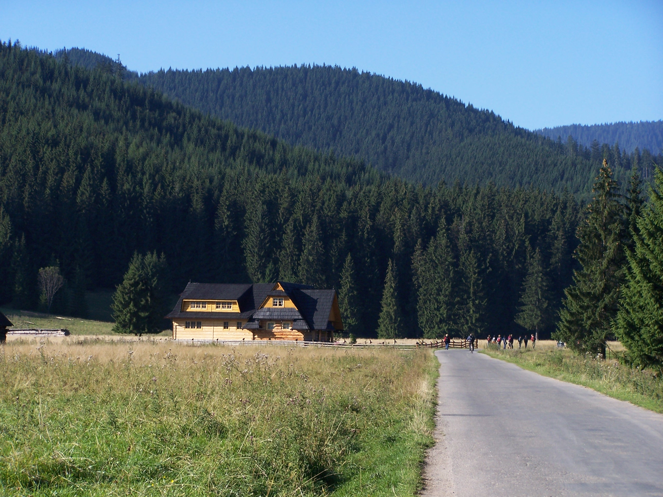 Siwa Polana (Dolina Chochołowska, Tatra Mountains)